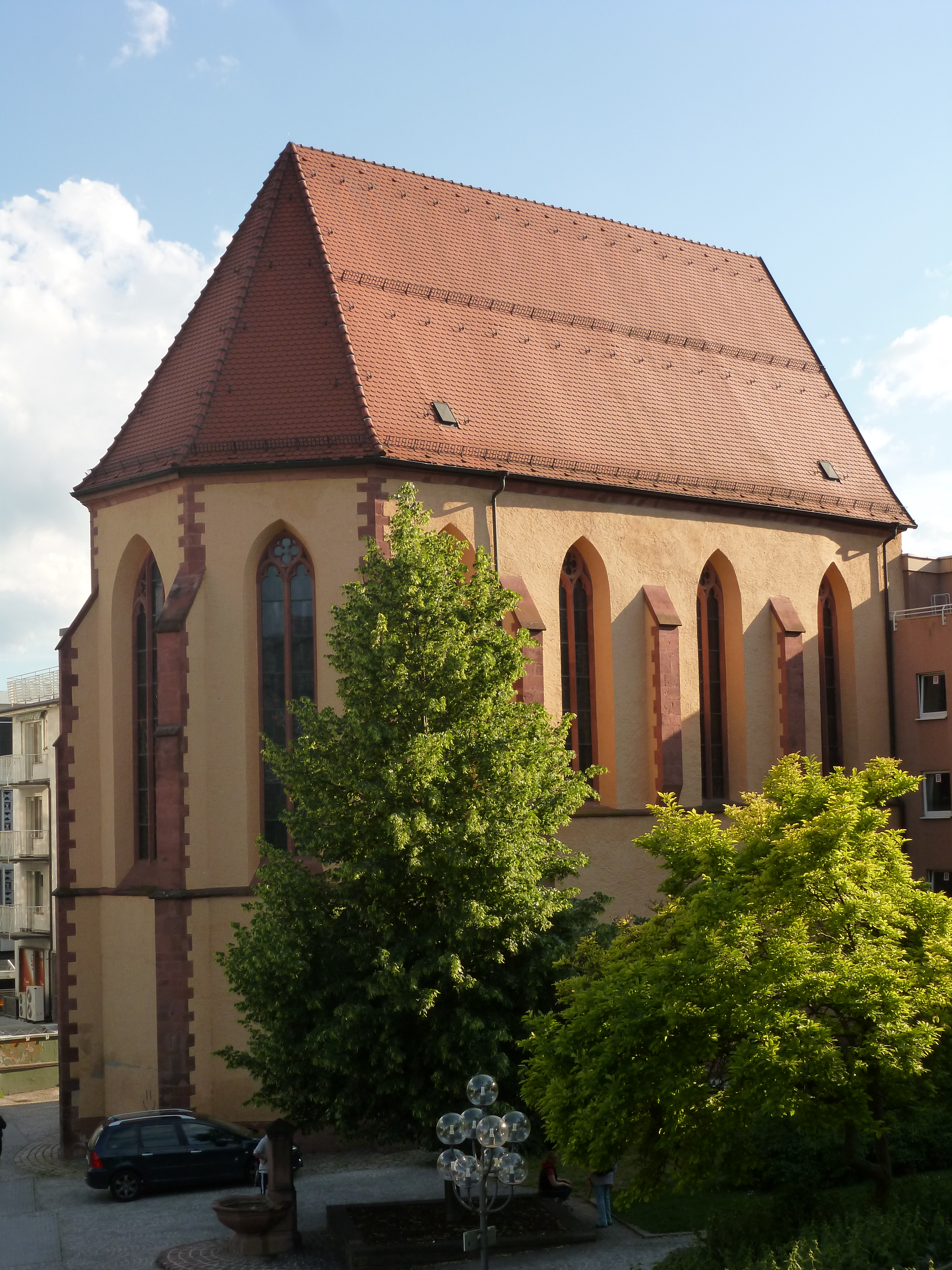 Église de l’ancien couvent des franciscains à Pforzheim.